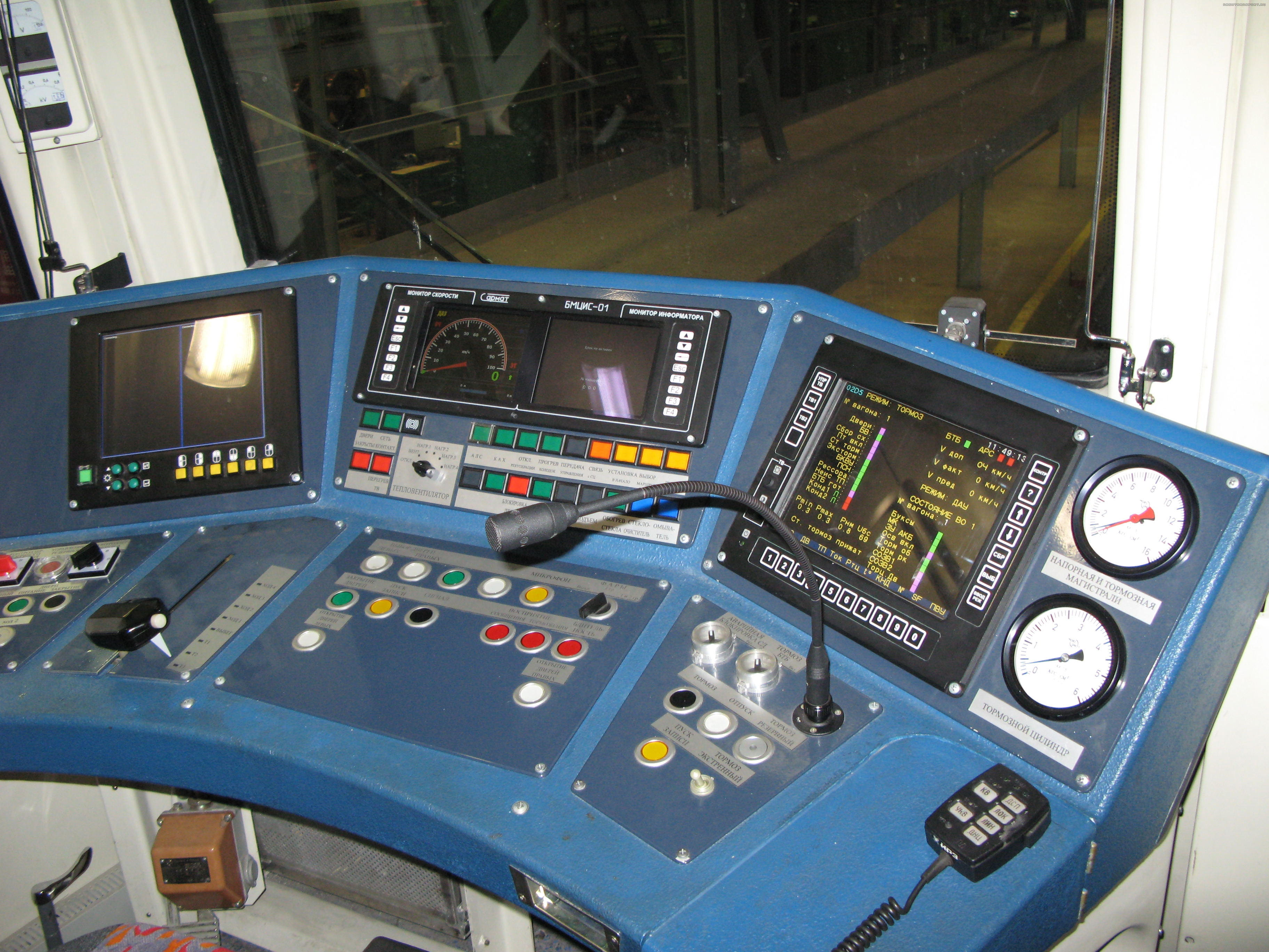 Пульт управления в кабине электропоезда метро 81-760/761